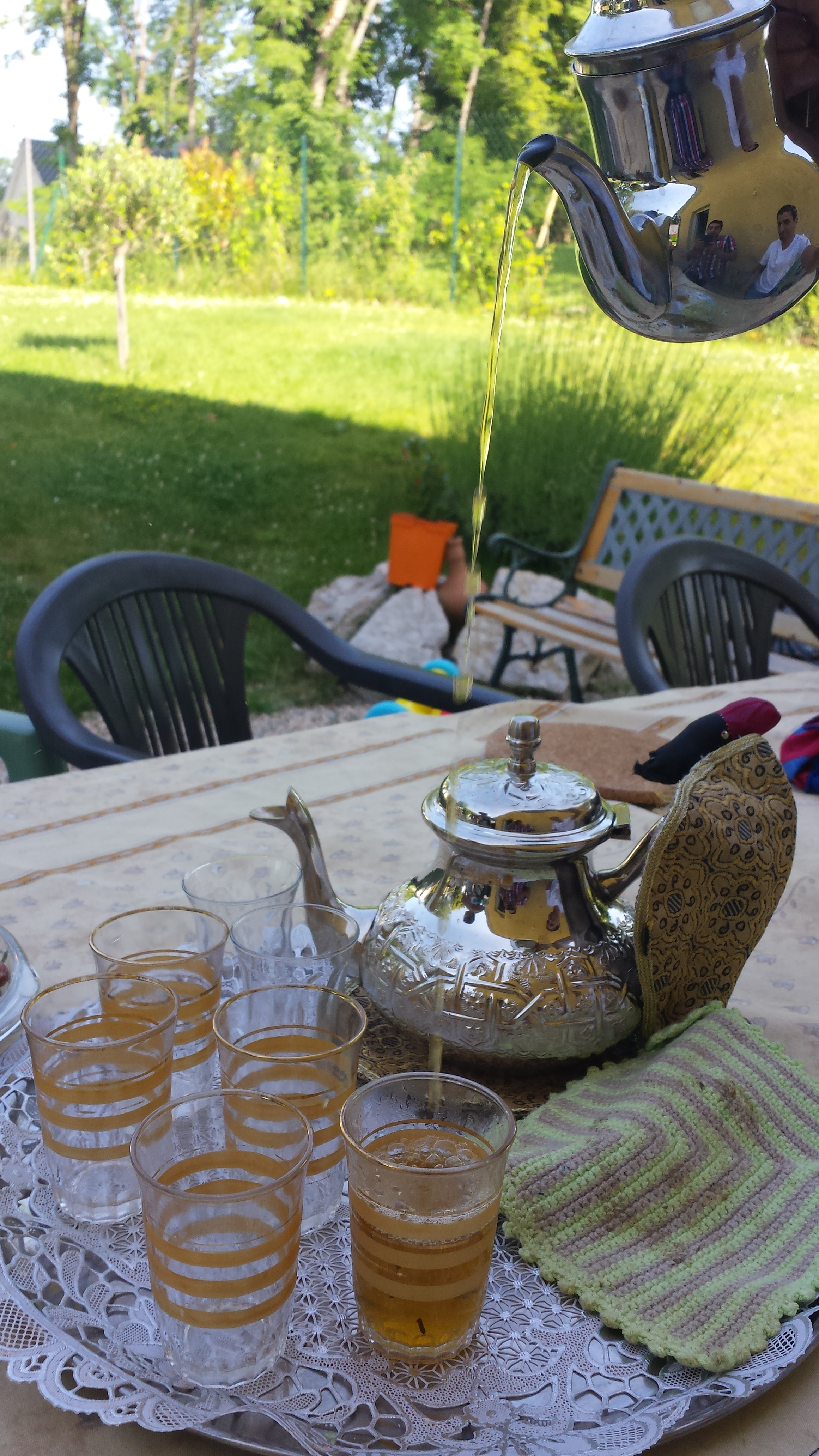 thé marocain à la menthe This is an image of food from Morocco